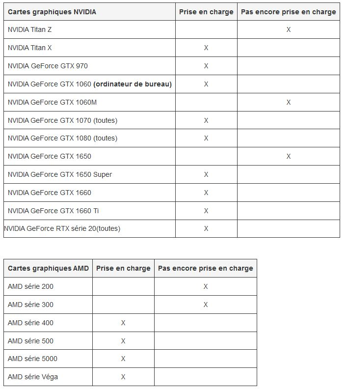 Liste des cartes graphiques compatible ou non avec Oculus Link